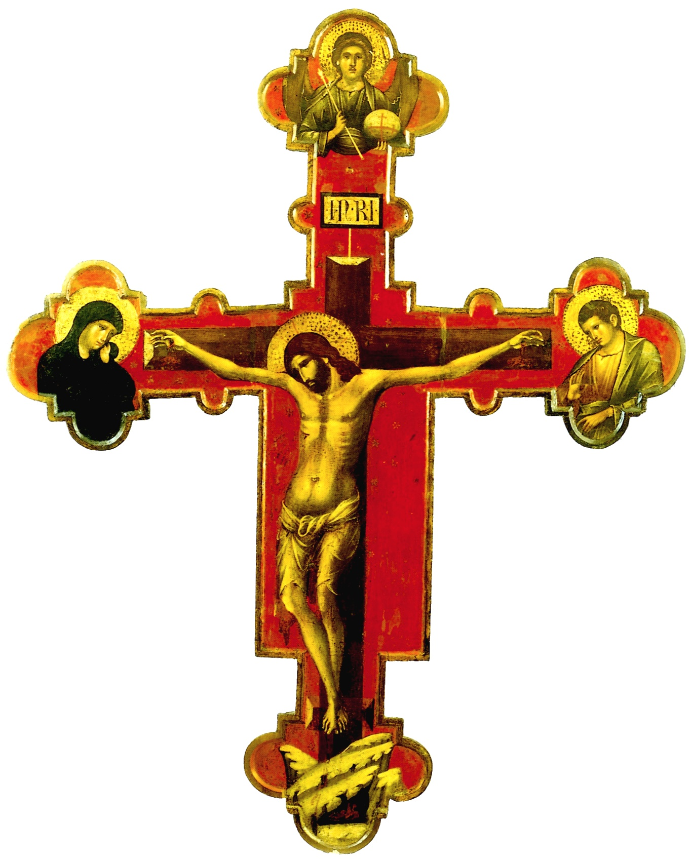 Crucifixion-paolo_veneziano_1324-50_Trogir_monast..